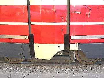 Een PCC-draaistel onder een Haagse tram, eigen foto